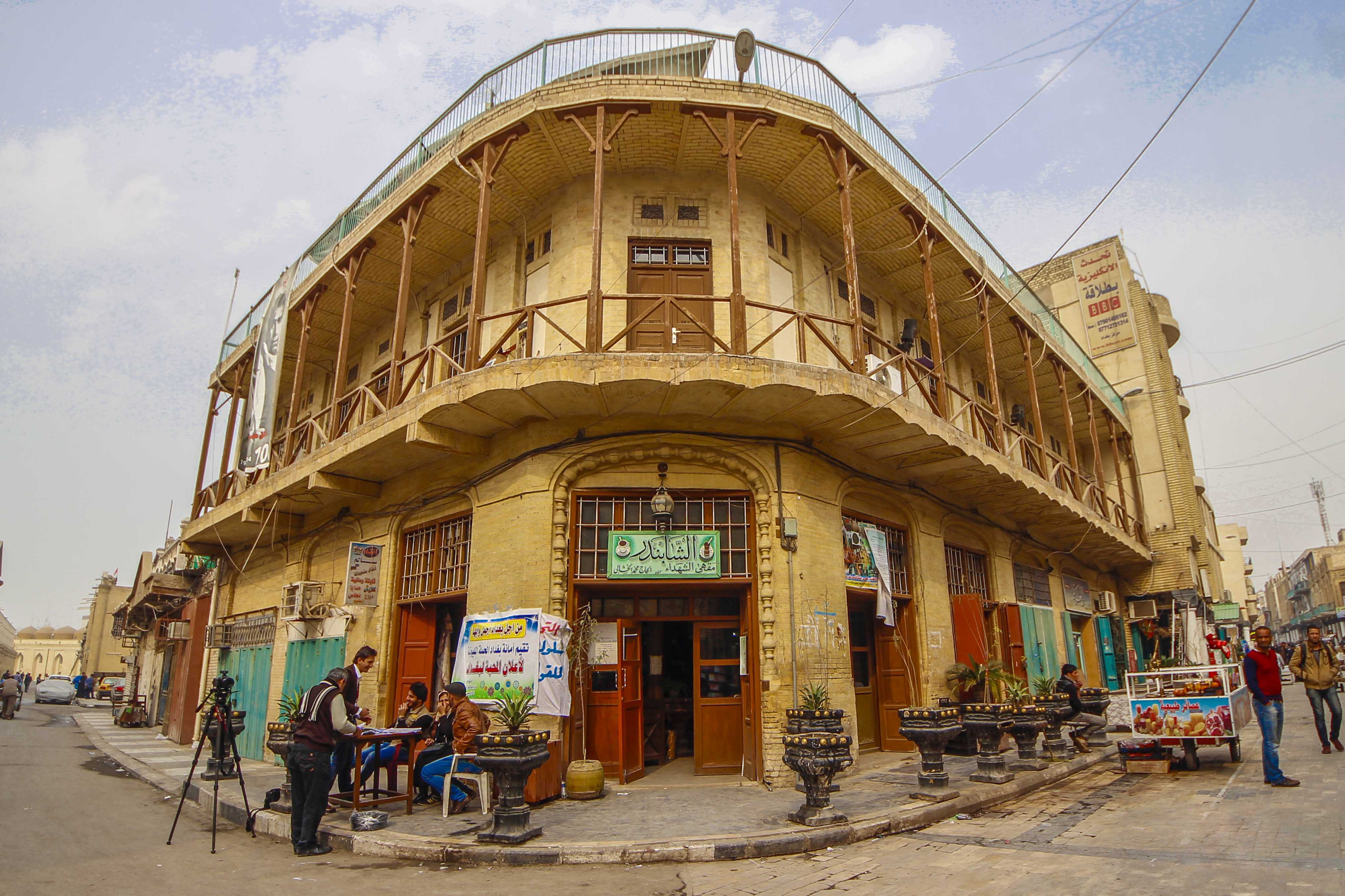 مقهى الشاهبندر في شارع المتنبي ببغداد